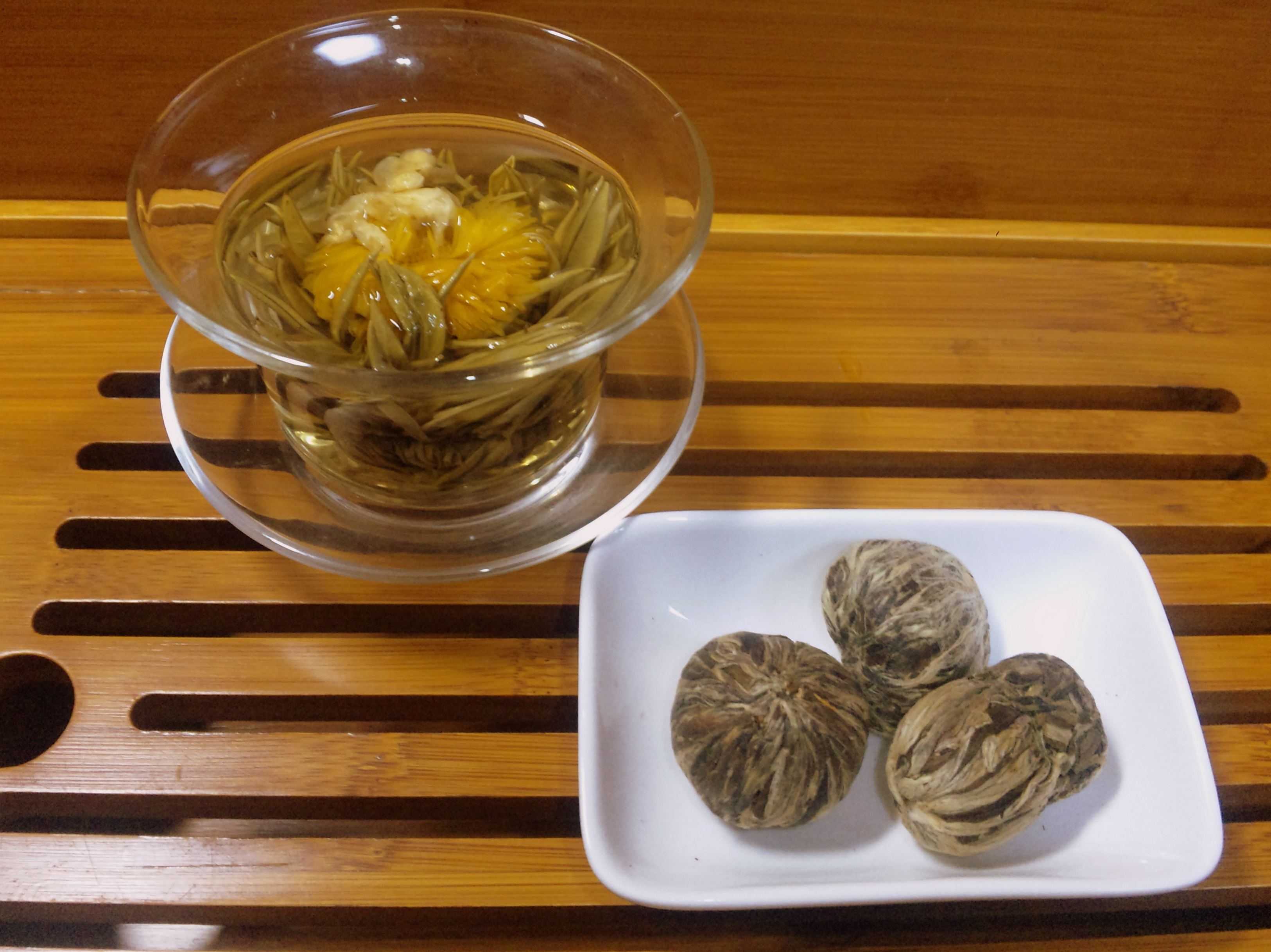 工芸茶３種の形状と、実際に蓋椀で煎れた工芸茶